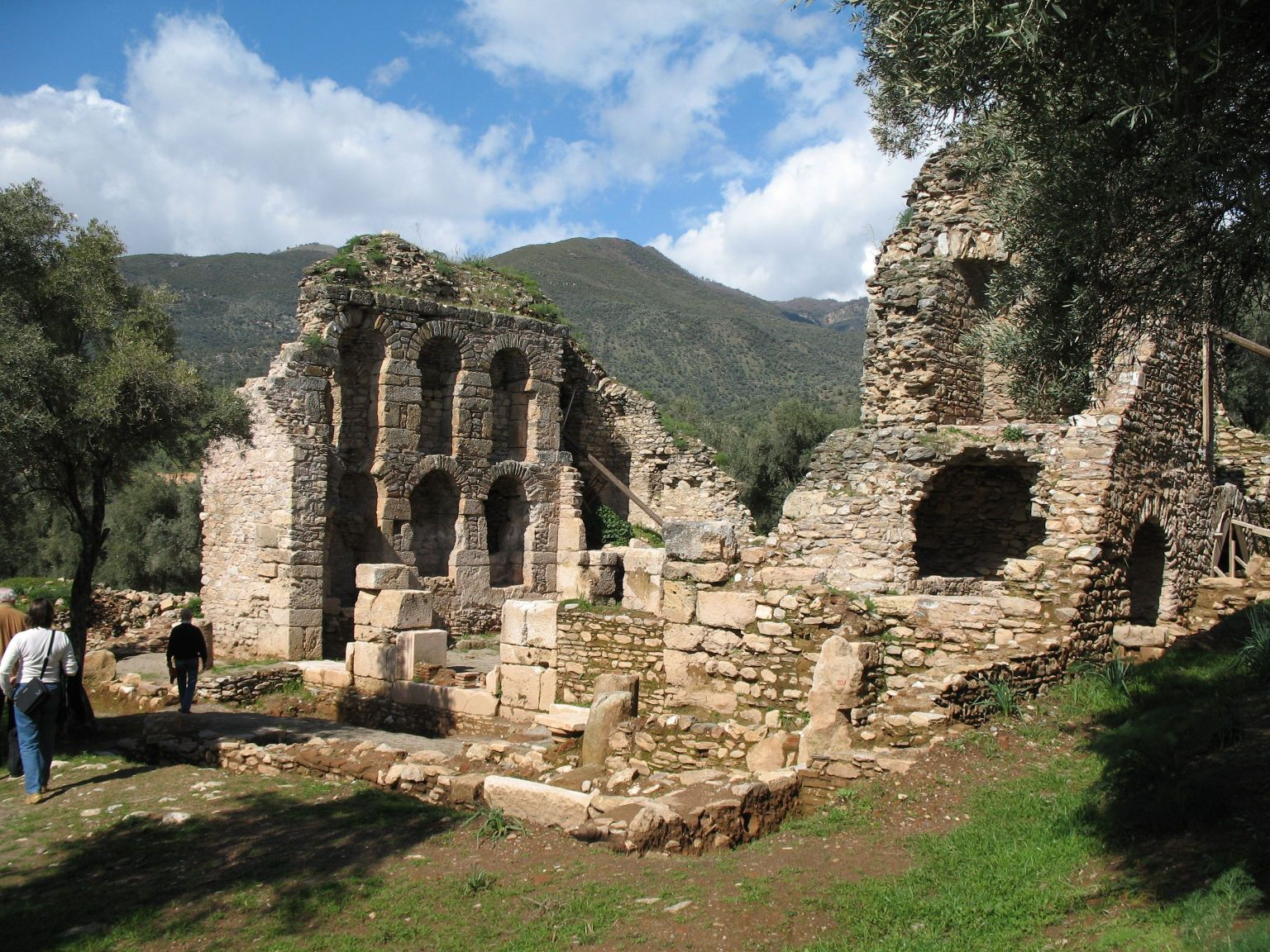 Nysa, Bibliothek